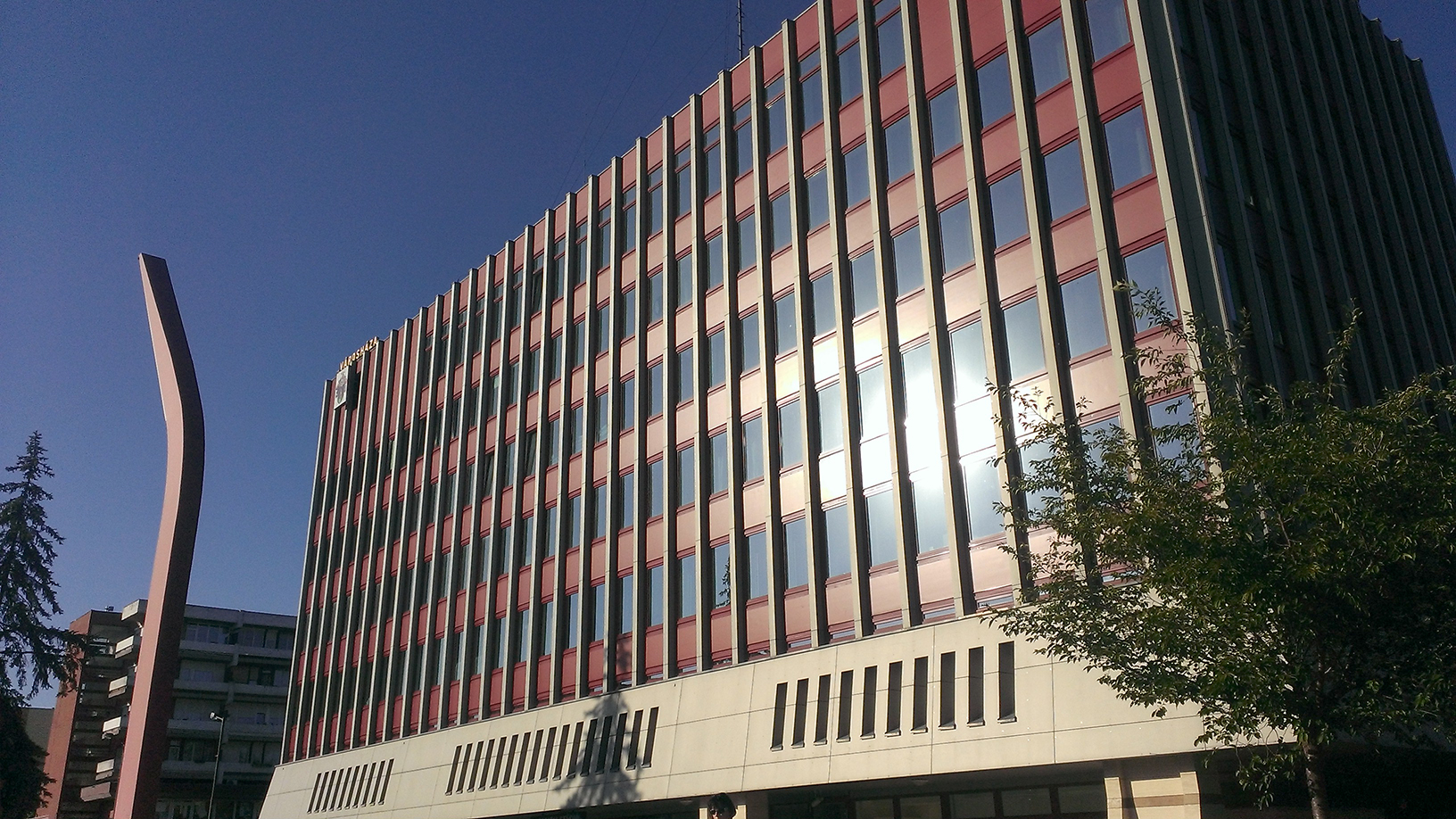 Ajka város polgármesteri hivatala 2014-ben, az este hat órás naplementében. Építés éve: 1967. Tervezte: Rutkay Gyula Ybl-díjas építész 2008-2010 között felújítva, 525 ablak csere, hatodik emeleten két új helyiség készült. [1]